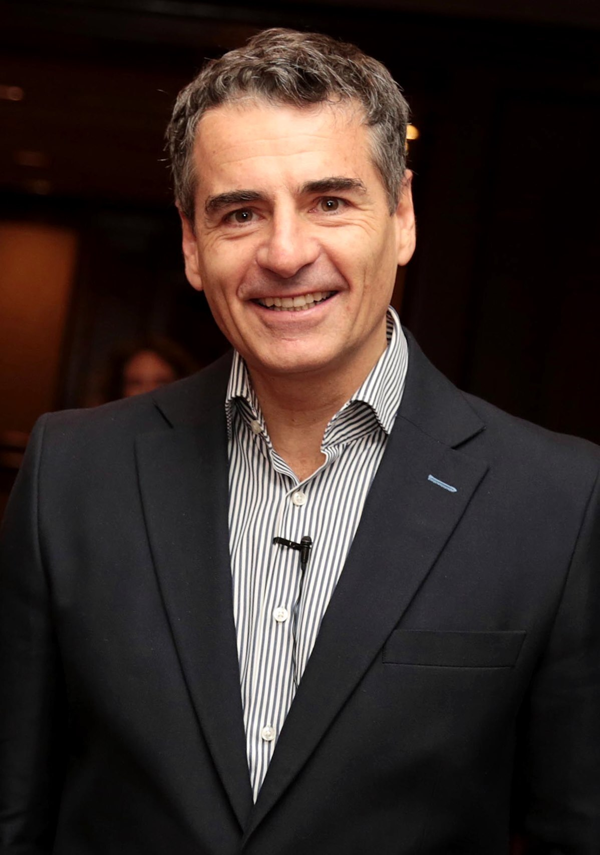 Andrés Velasco Brañes